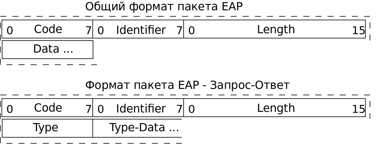 Структура пактов EAP